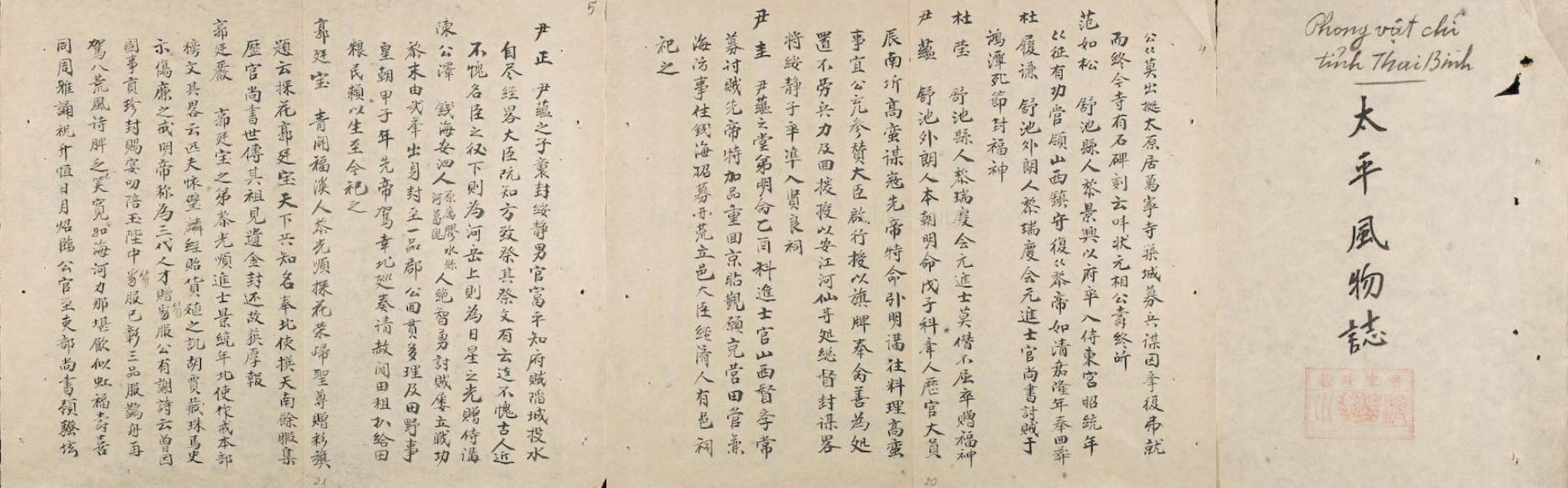 Một số trang Thái Bình phong vật chí viết về vài danh nhân quê ở vùng đất ngày nay là tỉnh Thái Bình.